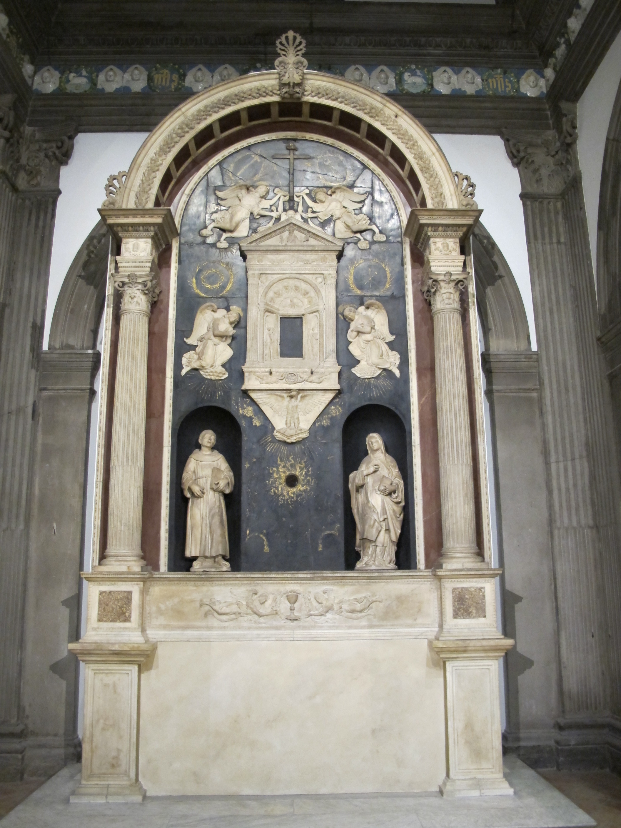 pala di santa chiara, firenze, 1493-1497 ca.